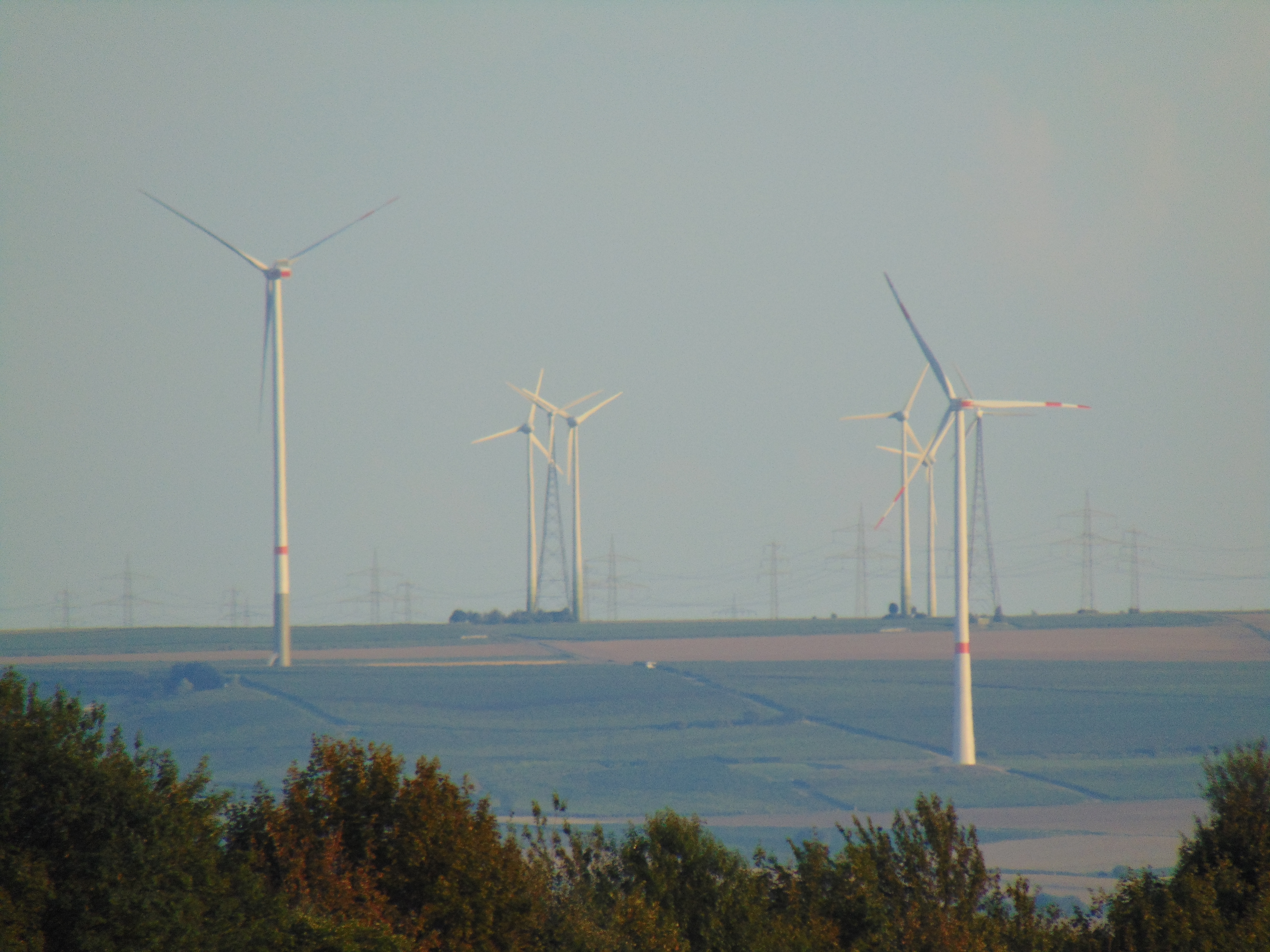 Blick von Wörrstadt auf den Windpark Hochborn, Rheinland-Pfalz, Deutschland